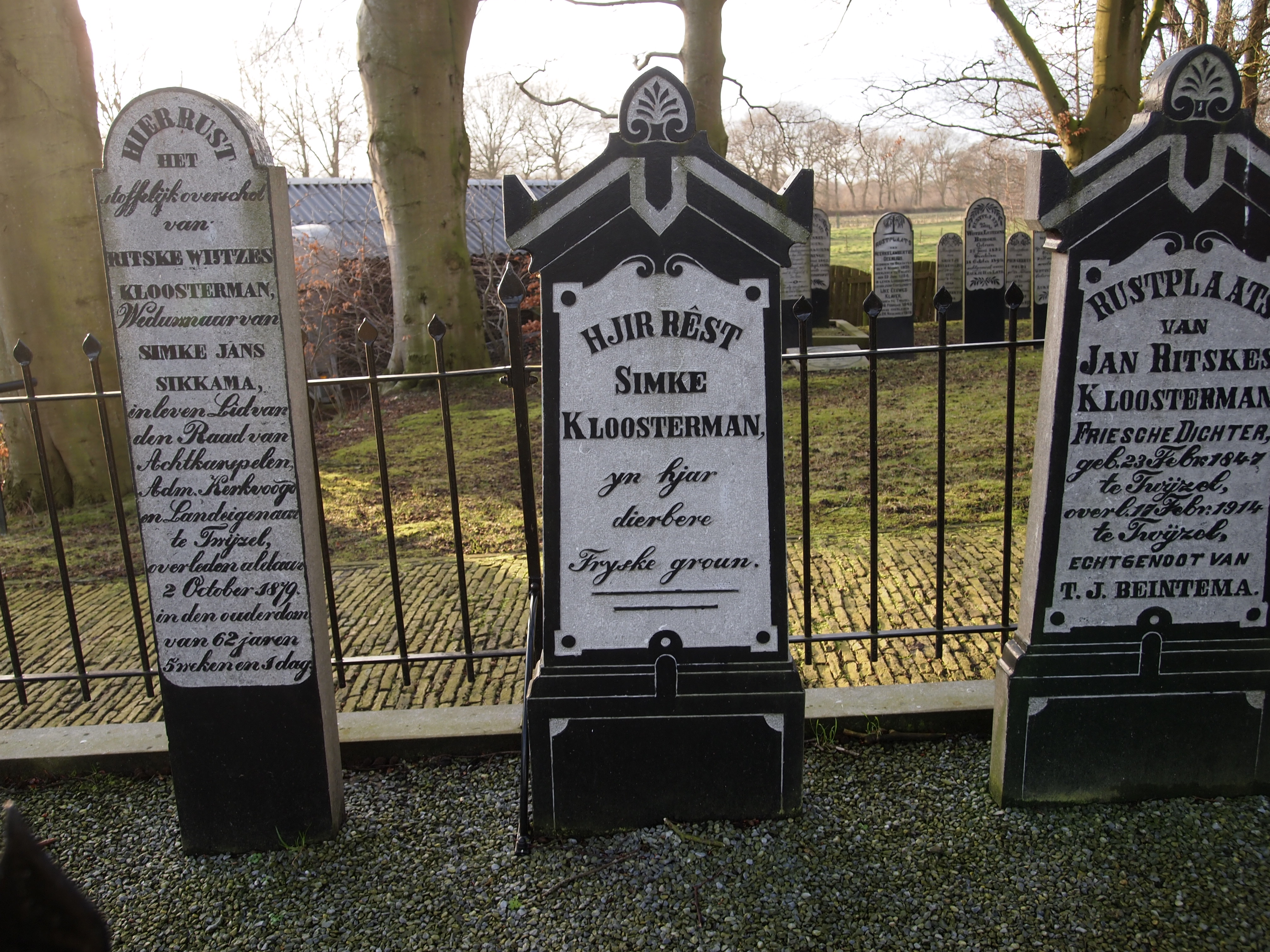 De graven van Simke Kloosterman, schrijfster en haar vader en grootvader. Twijzel